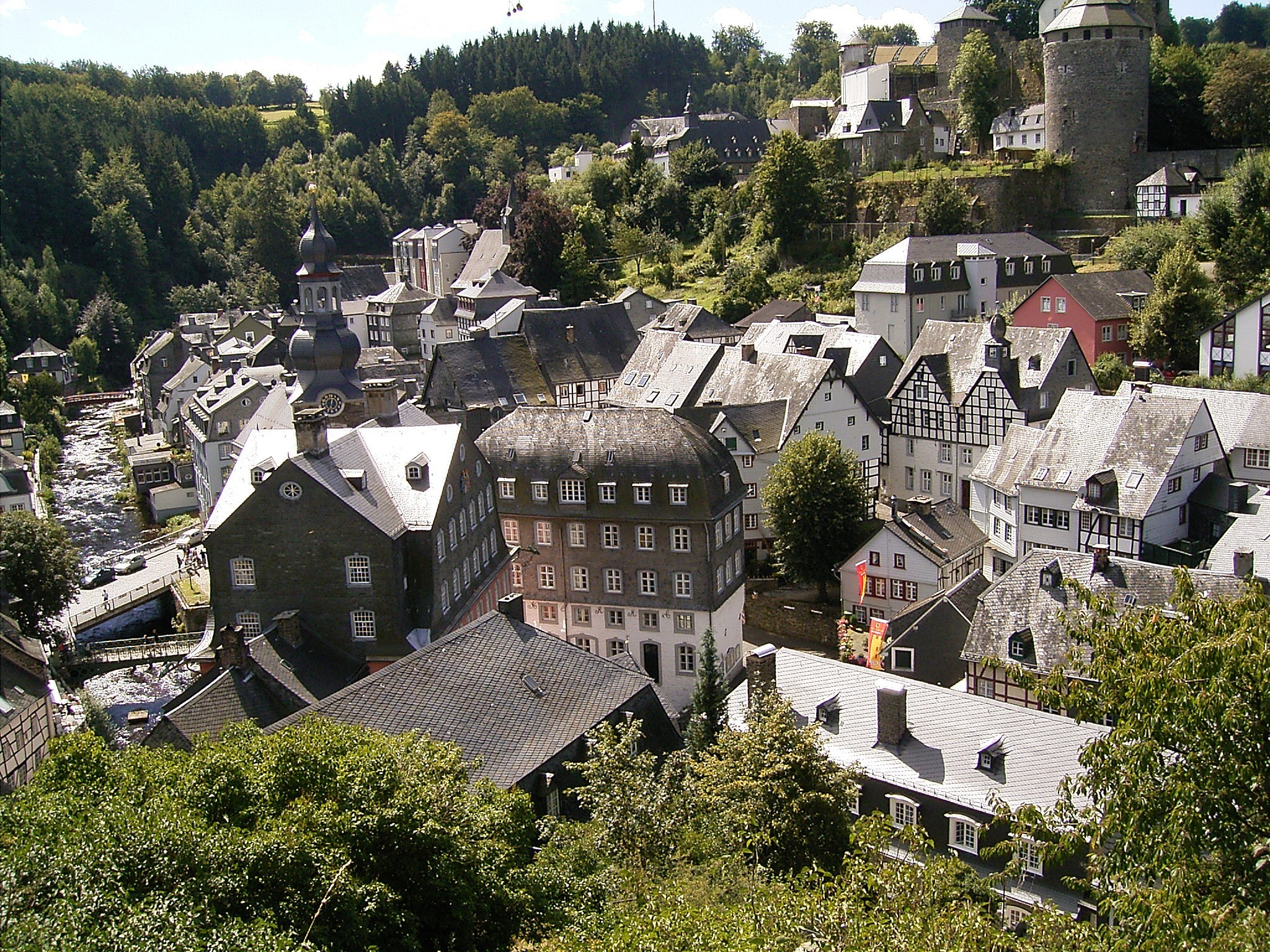 Monschau